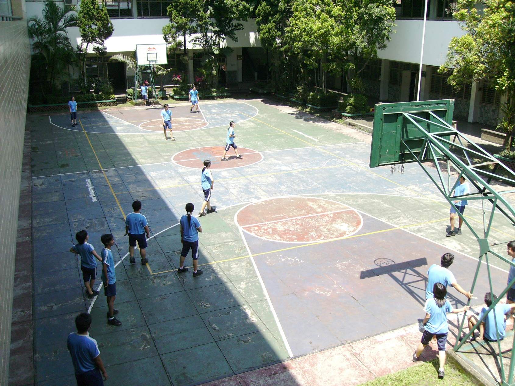 Siswi-siswa SMA Trinitas bermain permainan tradisional "Benteng"